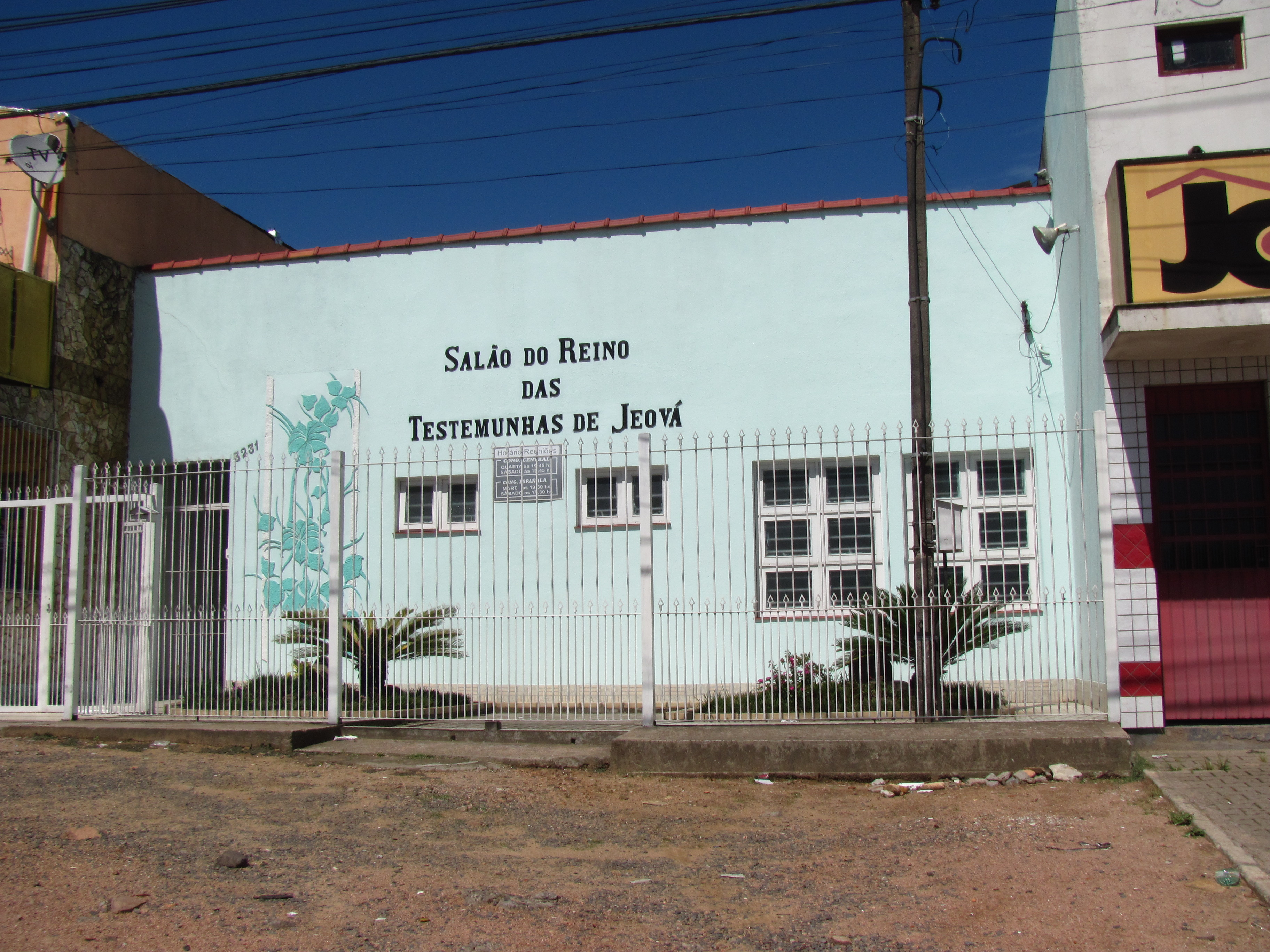 Salão do Reino das Testemunhas de Jeová